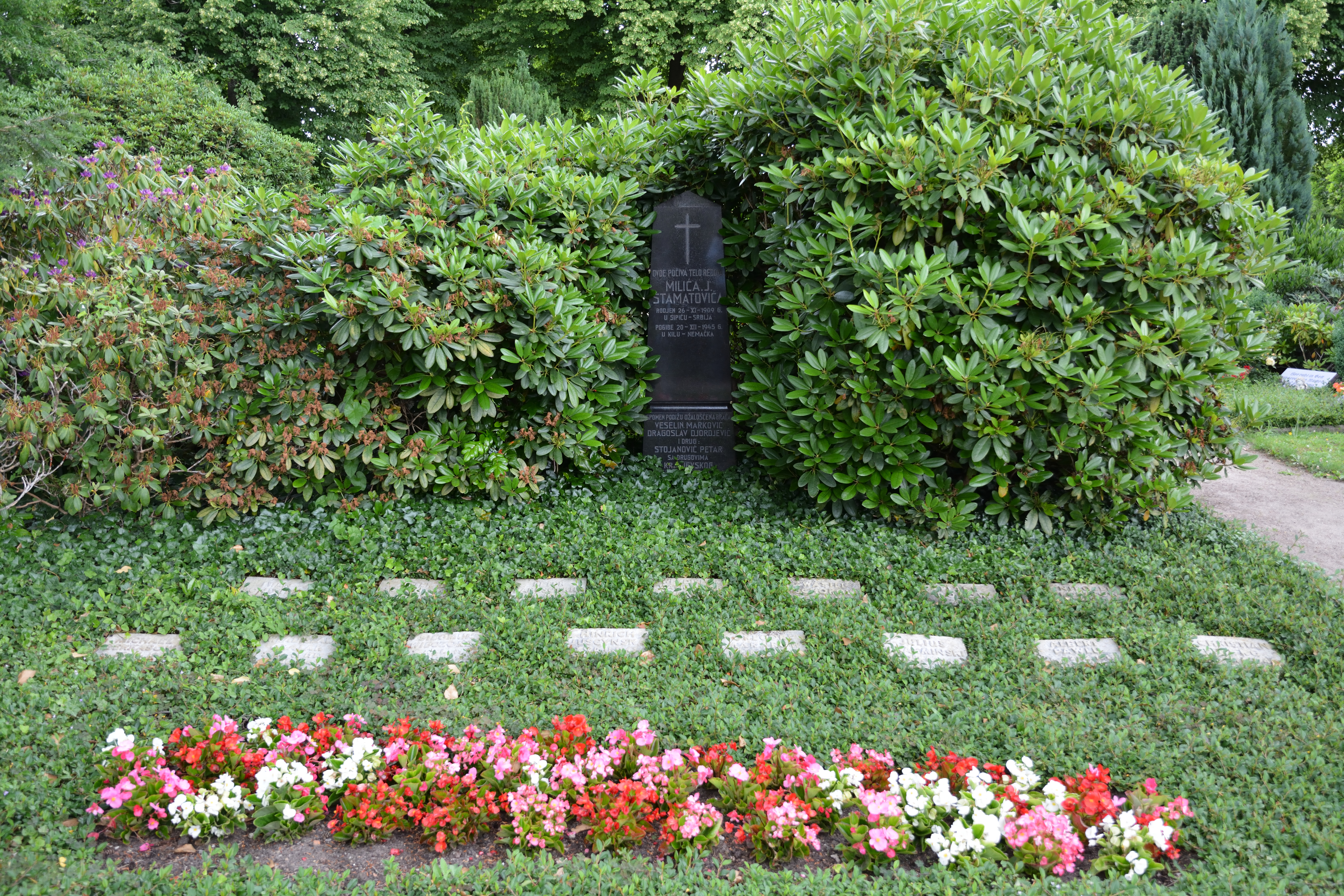 Kriegsgräber auf dem Friedhof von Bordesholm